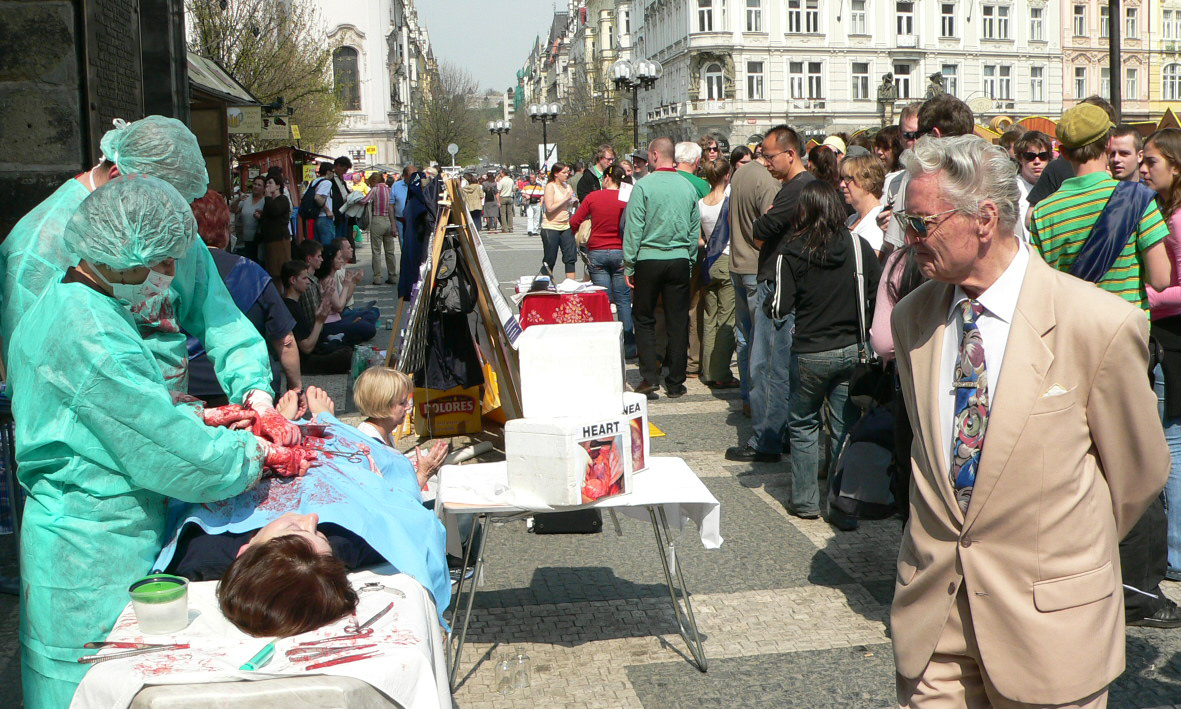 Česky: Foto z protestní akce proti odebírání orgánů v čínských nemocnicích přidružených k pracovním táborům. Zdrojem orgánů jsou podle vyšetřovací zprávy na praktikující meditační praxe Falun Gong.